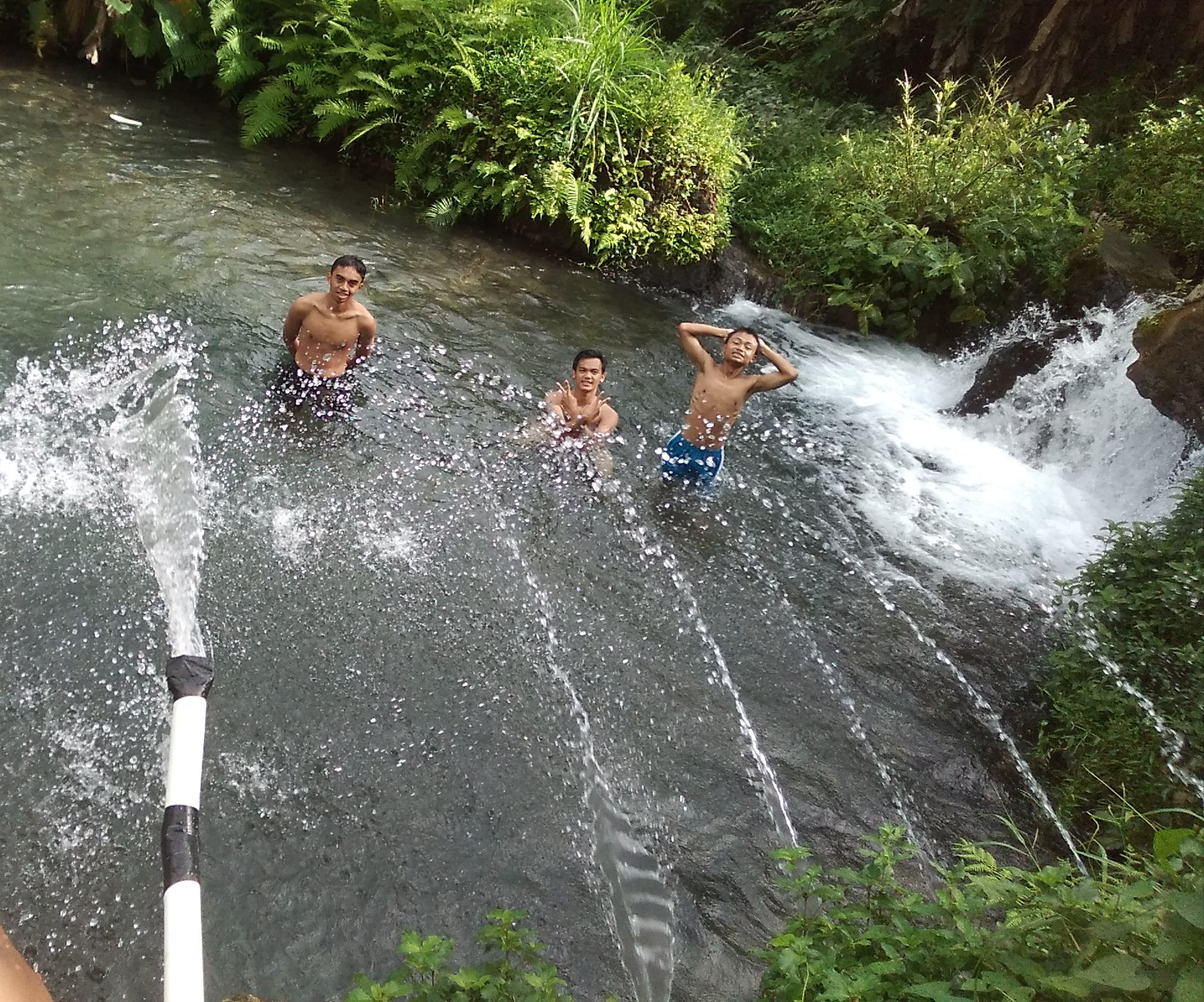 Jawa: Wong sing lagi padusan